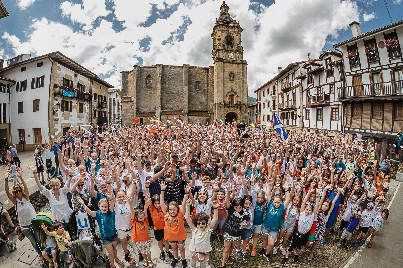 12.km Gure Esku Dagoren giza-katea, 2018. 1-20 kilometroak.